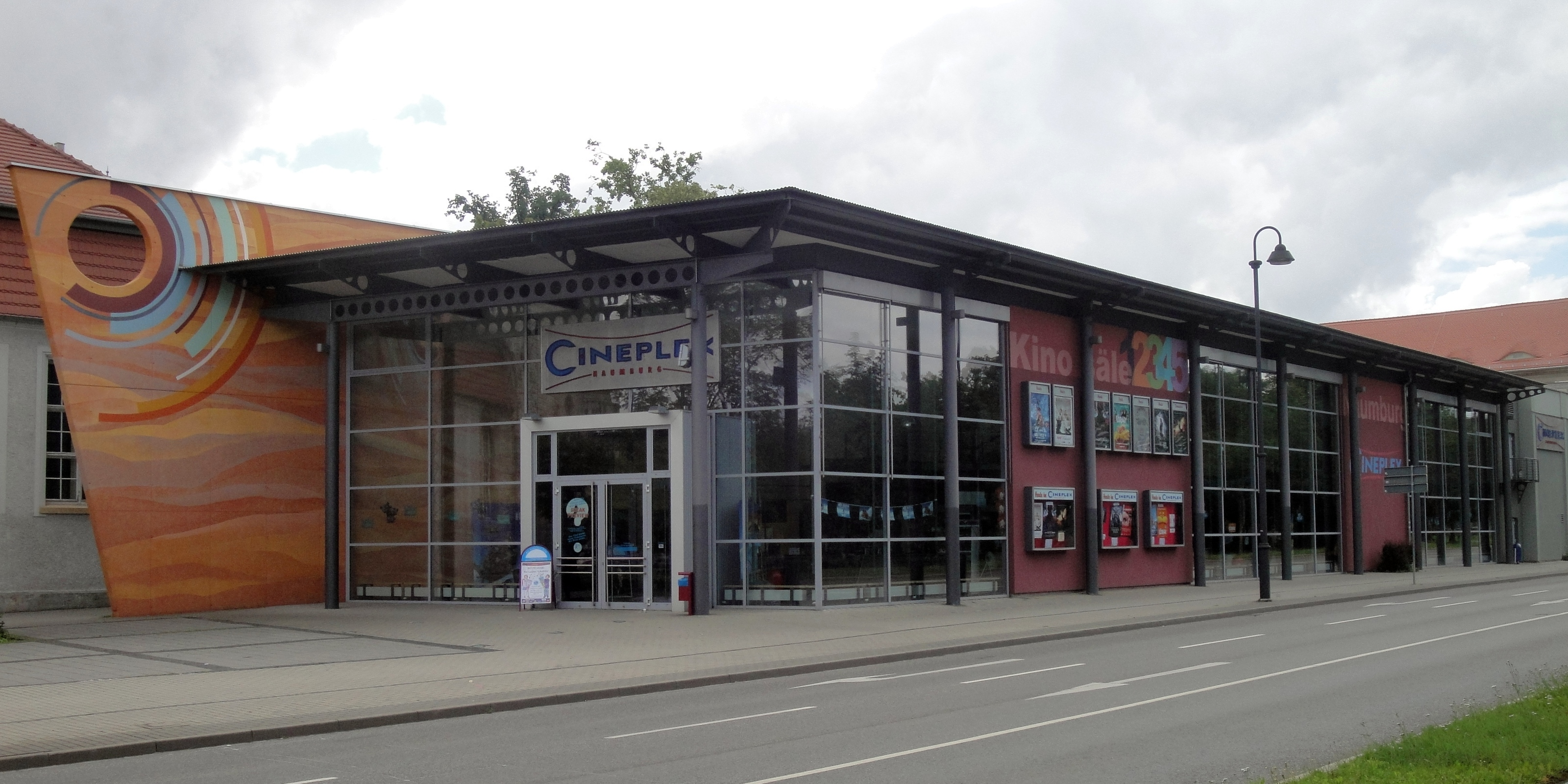 Kino Cineplex in Naumburg (Saale)